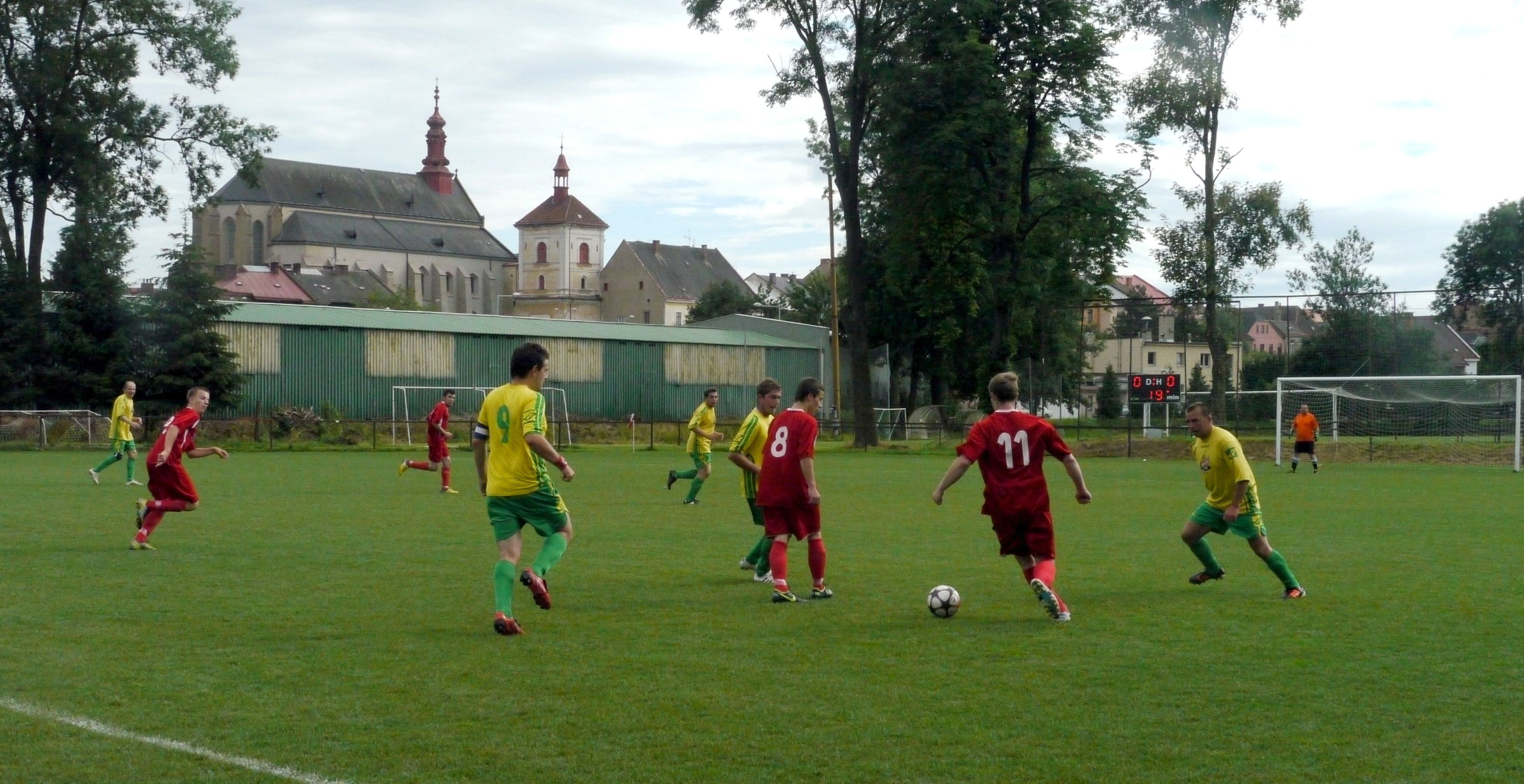 Trénink